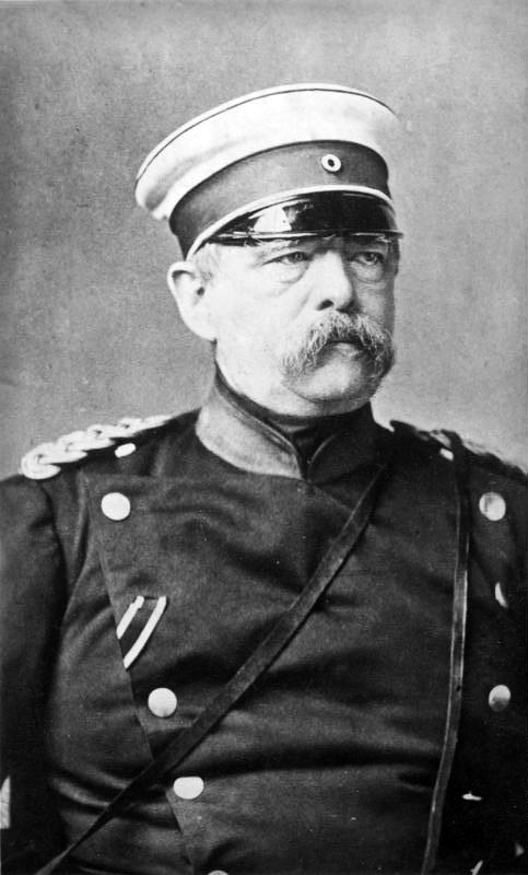 Otto von Bismarck Otto Fürst von Bismarck-Schönhausen preußisch-deutscher Staatsmann, geb. 1.4.1815 Schönhausen, gest. 30.7.1898 Friedrichsruh. 1862 wurde er zum preußischen Ministerpräsidenten und Außenminister berufen, ab 1867 zum Kanzler des Norddeutschen Bundes. Von 1871 bis 1890 war er Reichskanzler des am 18.1.1871 von ihm gegründeten Deutschen Kaiserreichs. Bismarck in Kürassieruniform im Kriegsjahr 1870. 1344-30 [Porträt] Abgebildete Personen: Bismarck, Otto von Fürst: Reichskanzler, Deutschland (PND 11851136X)